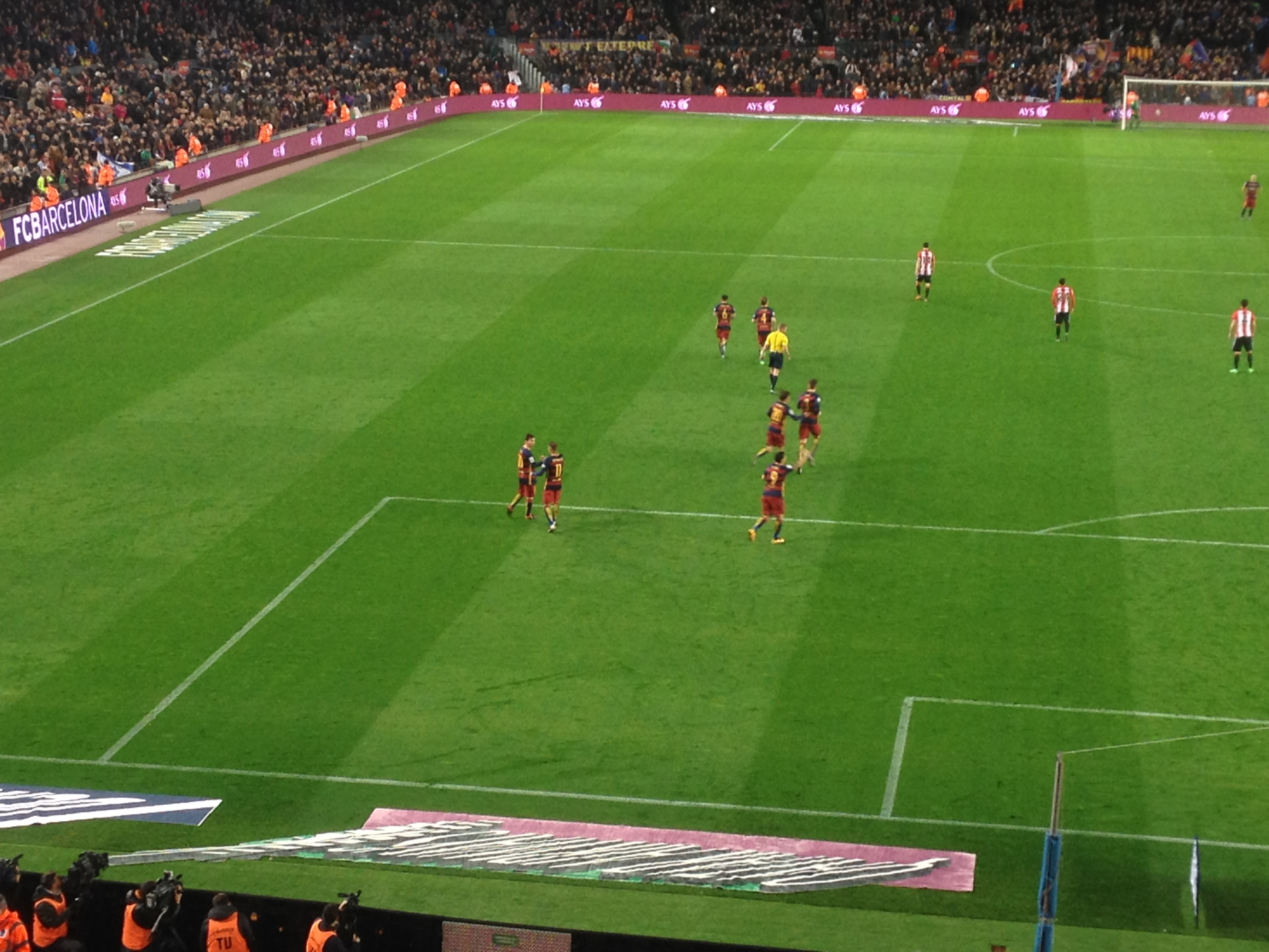 Momento del partido de vuelta de cuartos de final de la Copa del Rey 2015-16 entre FC Barcelona y Athletic Club.